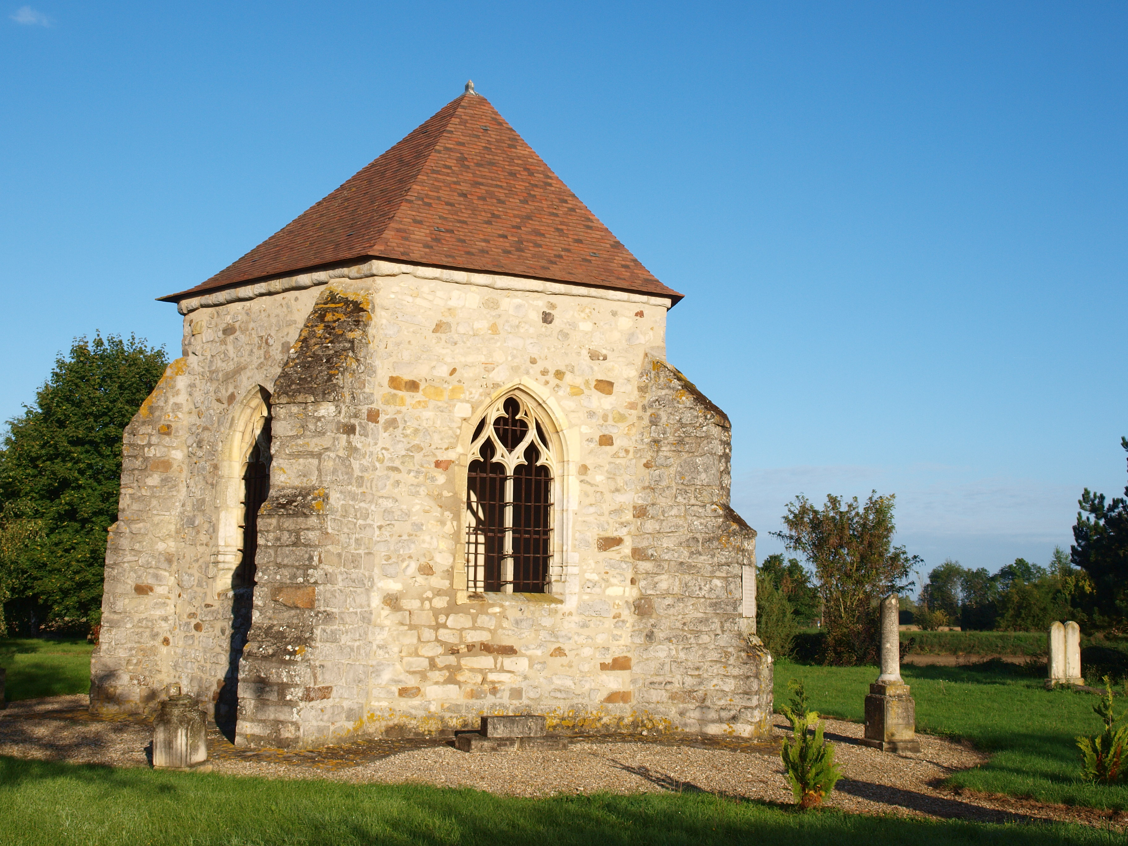 Chapelle et vieux cimetière de Gisy-les-Nobles (Yonne, France)